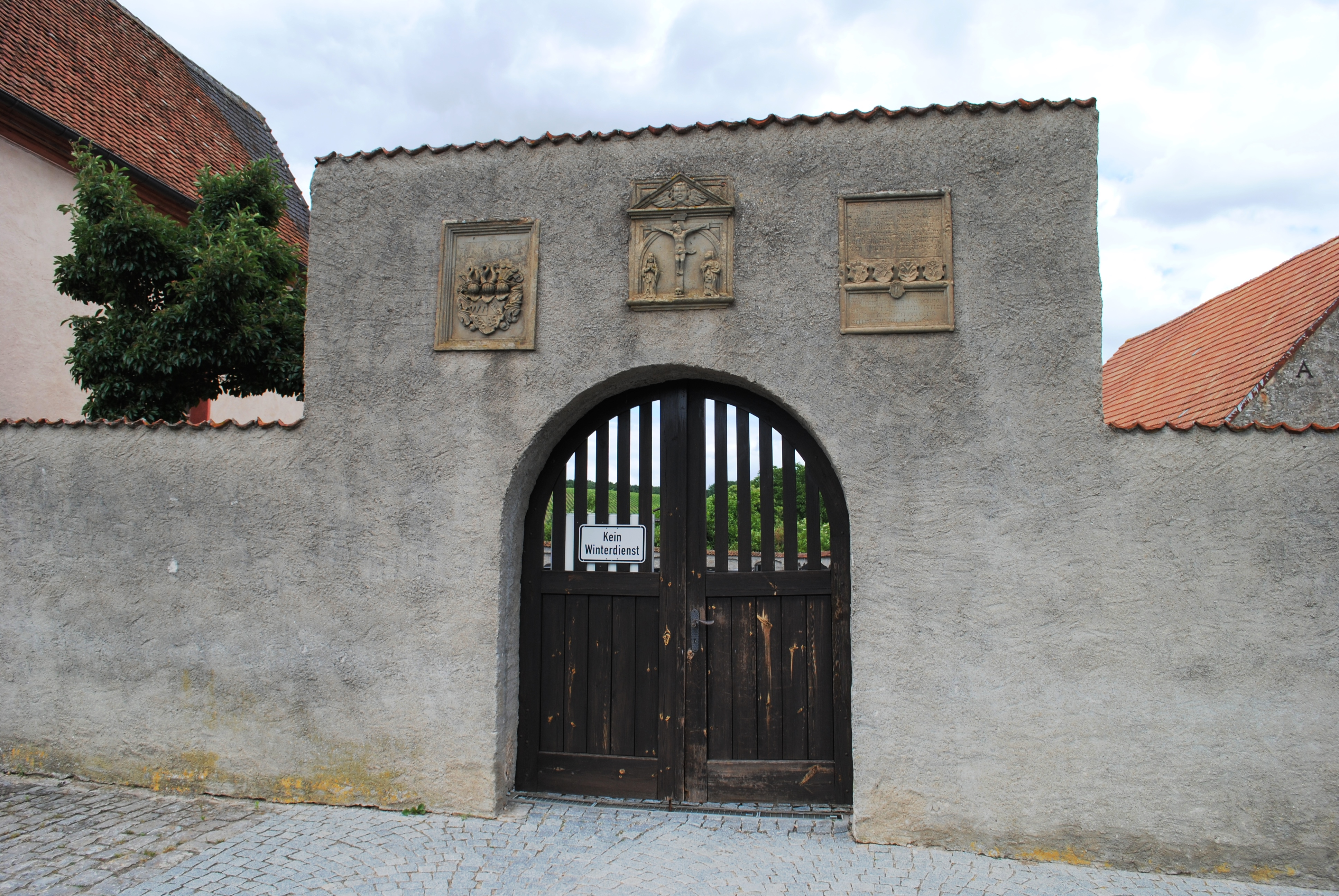 Friedhofstor, Obervolkach, Michaelistraße